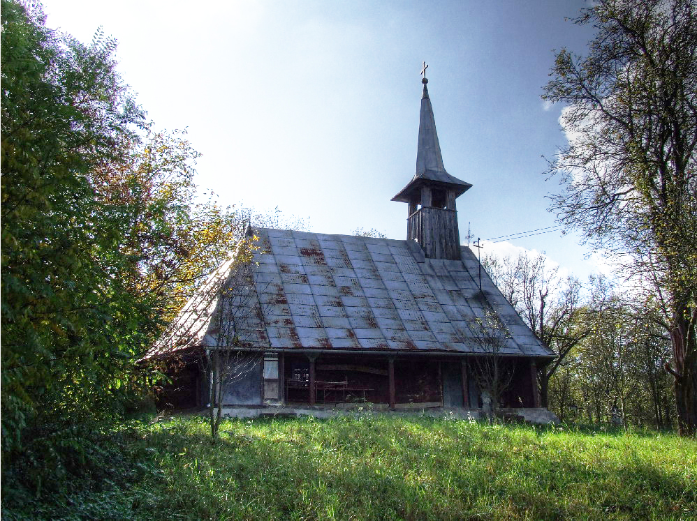 Biserica de lemn din Lacu Categorie:Biserici de lemn din Cluj (imagini)